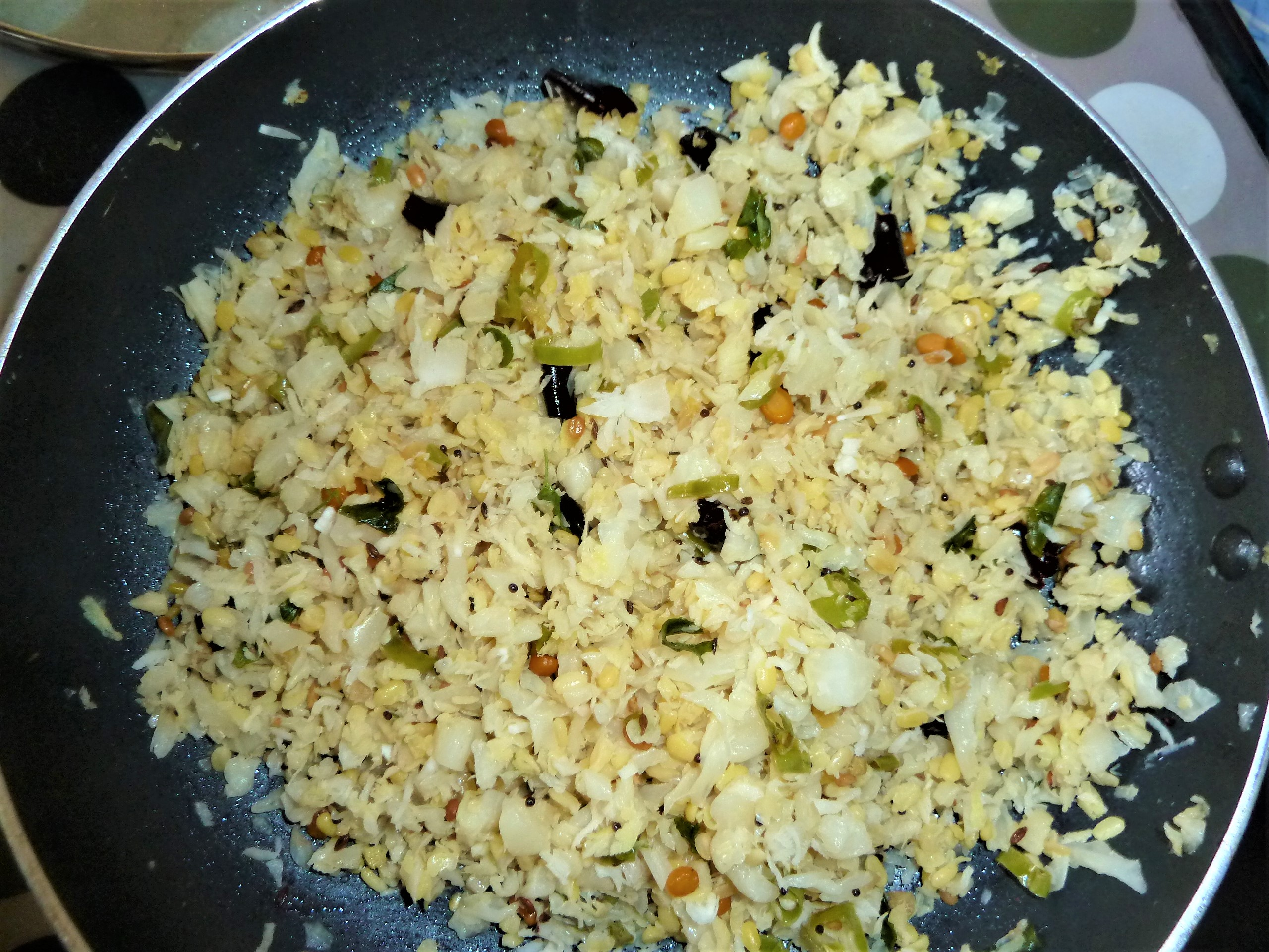 క్యాబేజీ మరియు పెసరపప్పు కూర